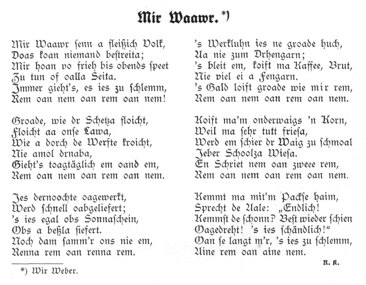 Mir Waawr (schlesisch für Wir Weber) - Gedicht in schlesischer Mundart